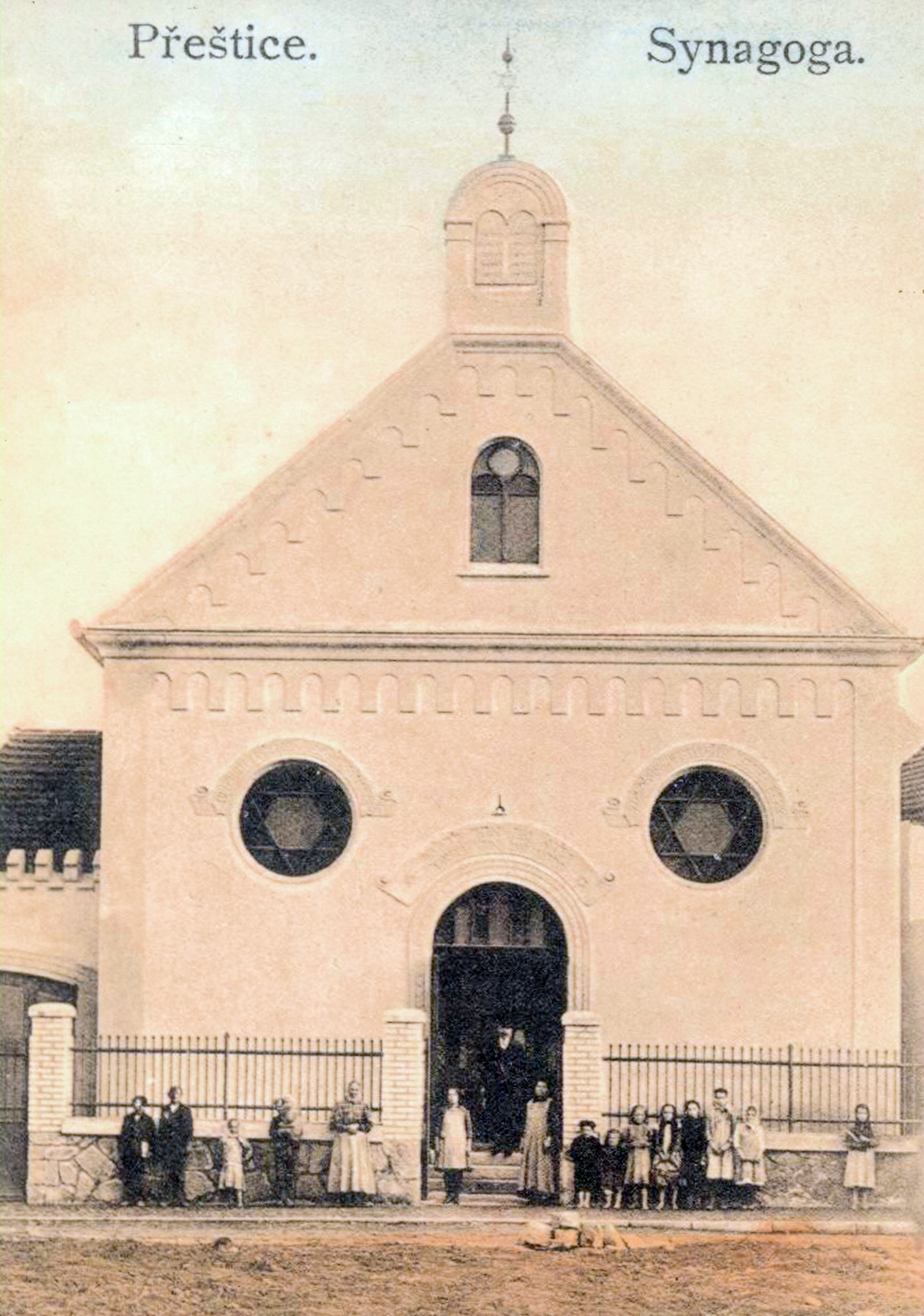 Synagoga v Přešticích This image was acquired during the event Wikiměsto Přeštice 2019.